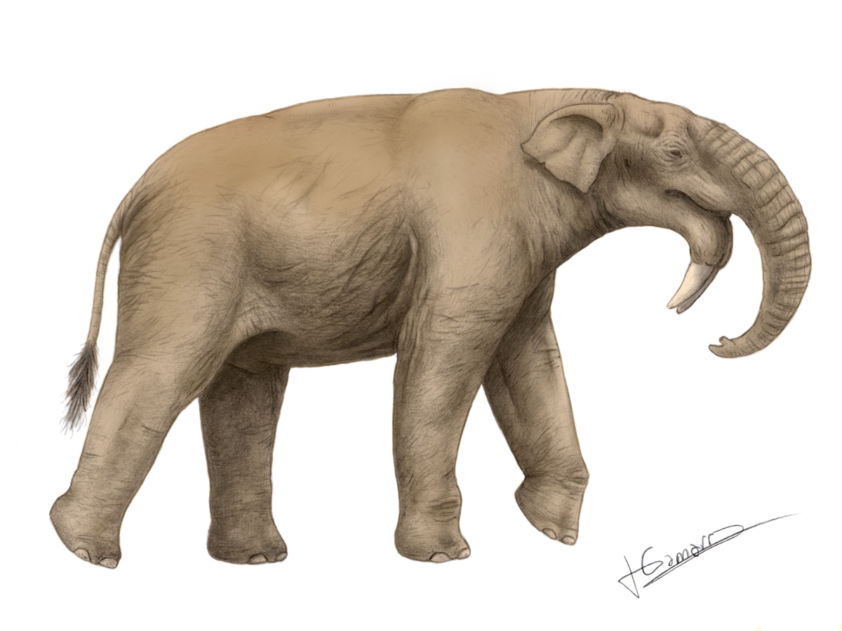 Deinotherium bozasi restoration